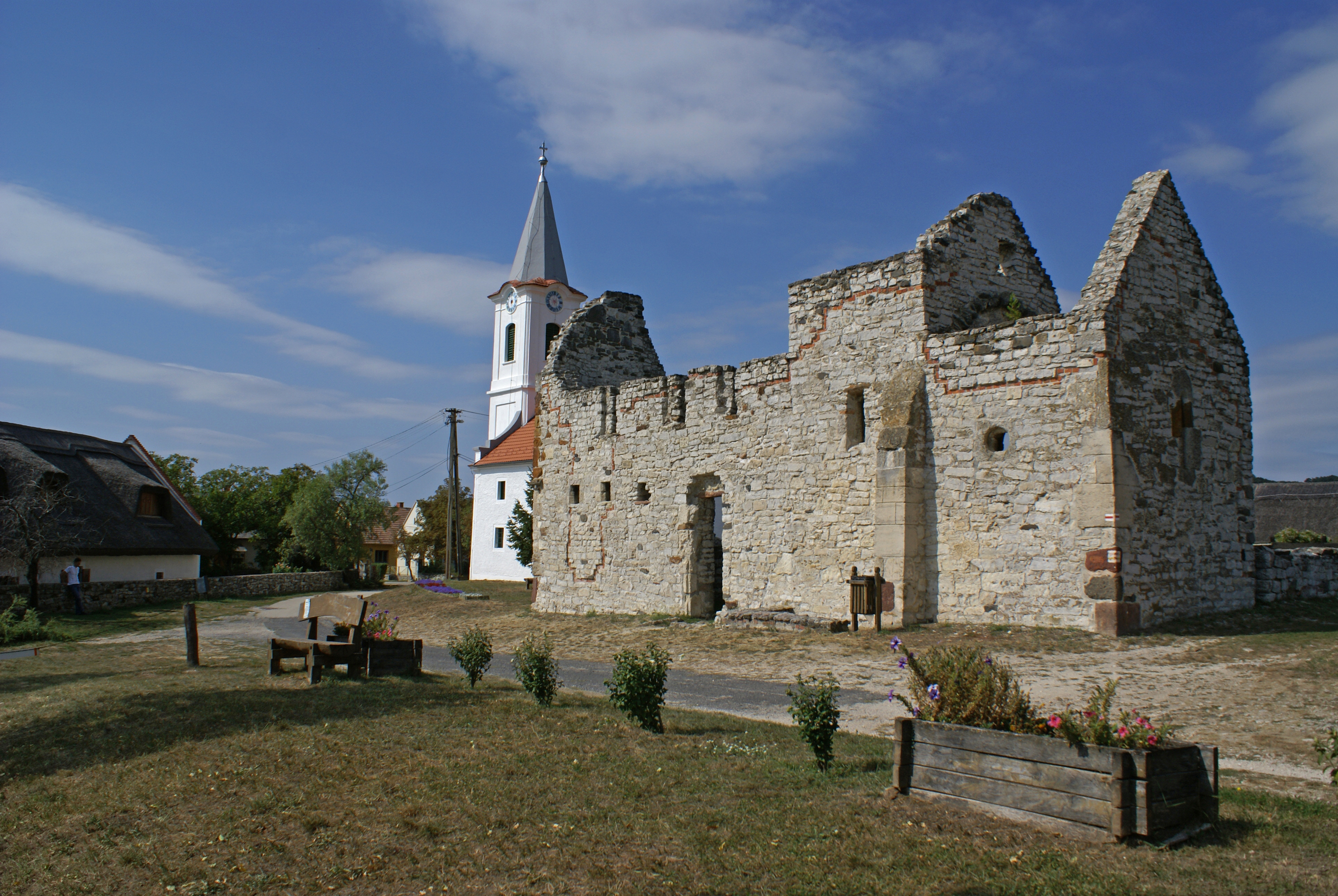 A kettős templom romja, Dörgicse (Felsődörgicse) This is a photo of a monument in Hungary. Identifier: 9849